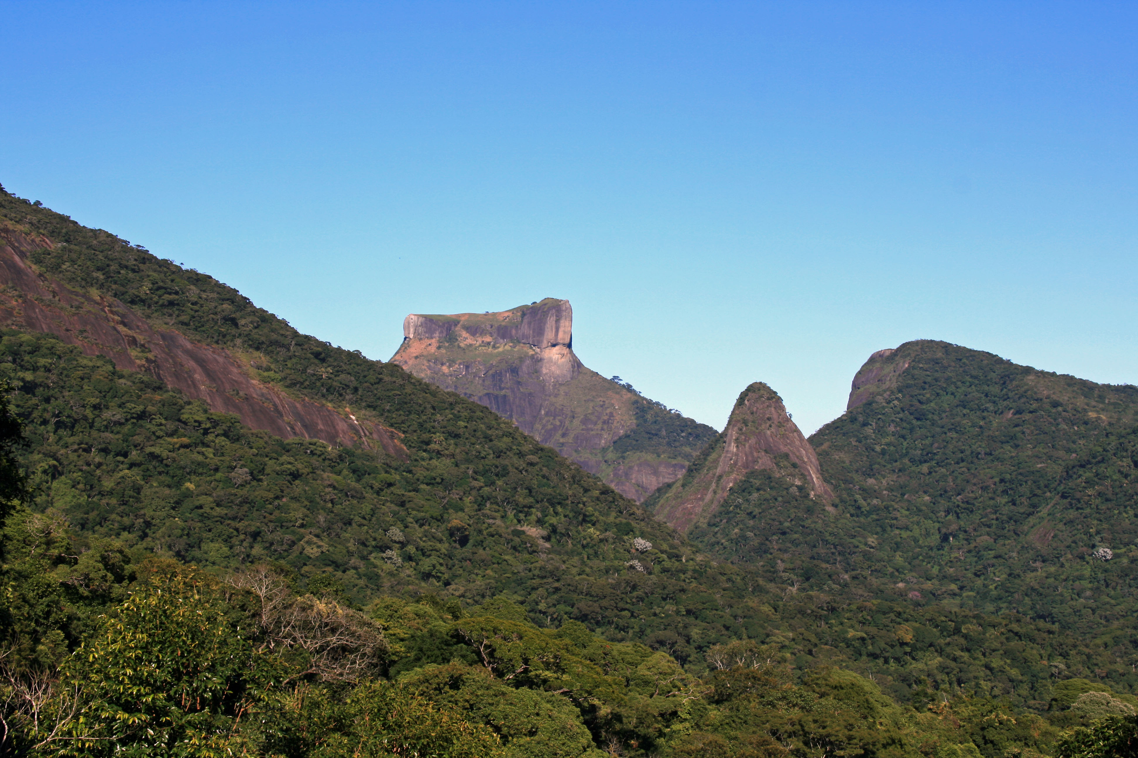 Floresta da Tijuca - Pedra da Gávea